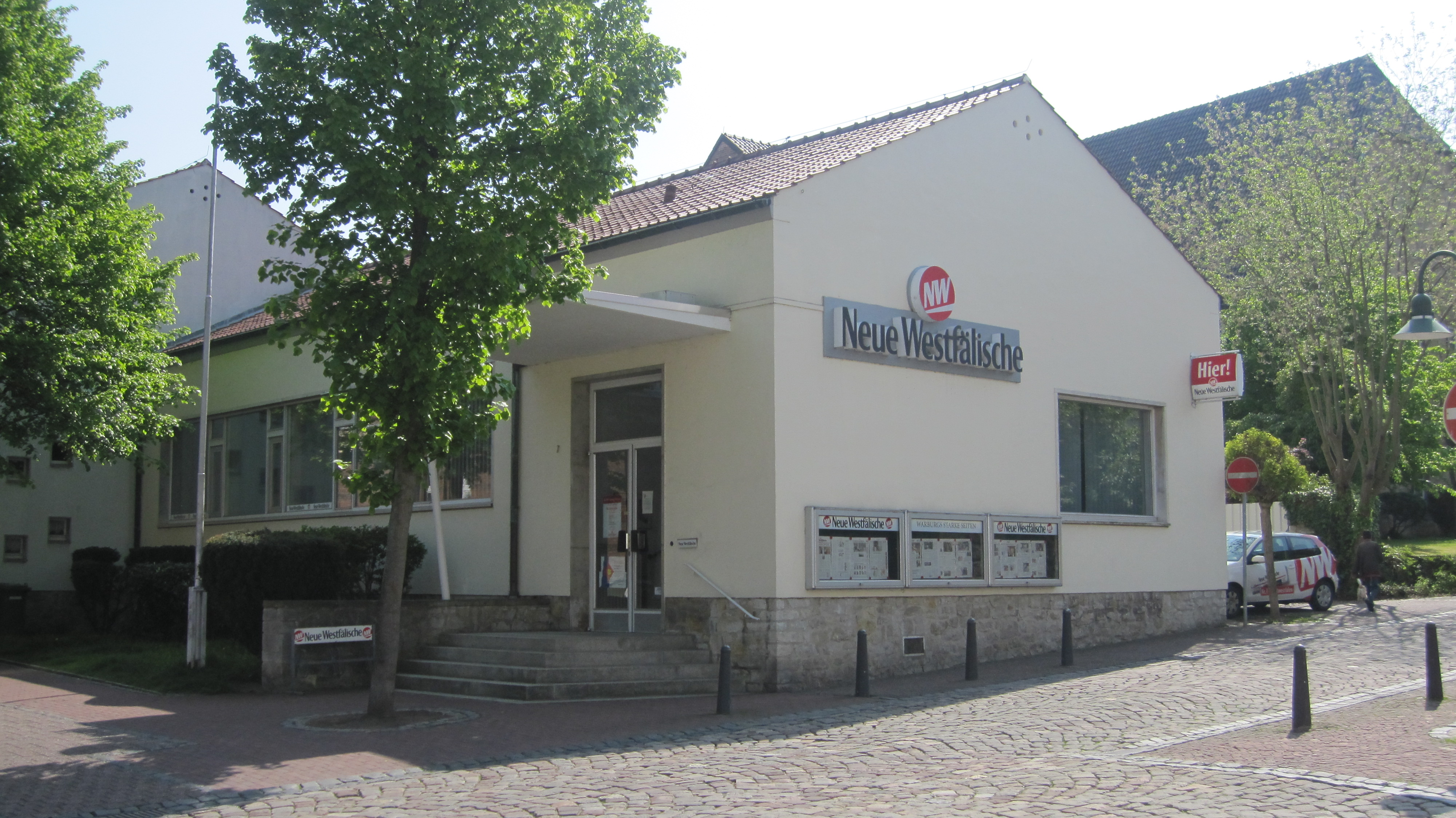 Die Lokalredaktion Warburg der Neuen Westfälischen.